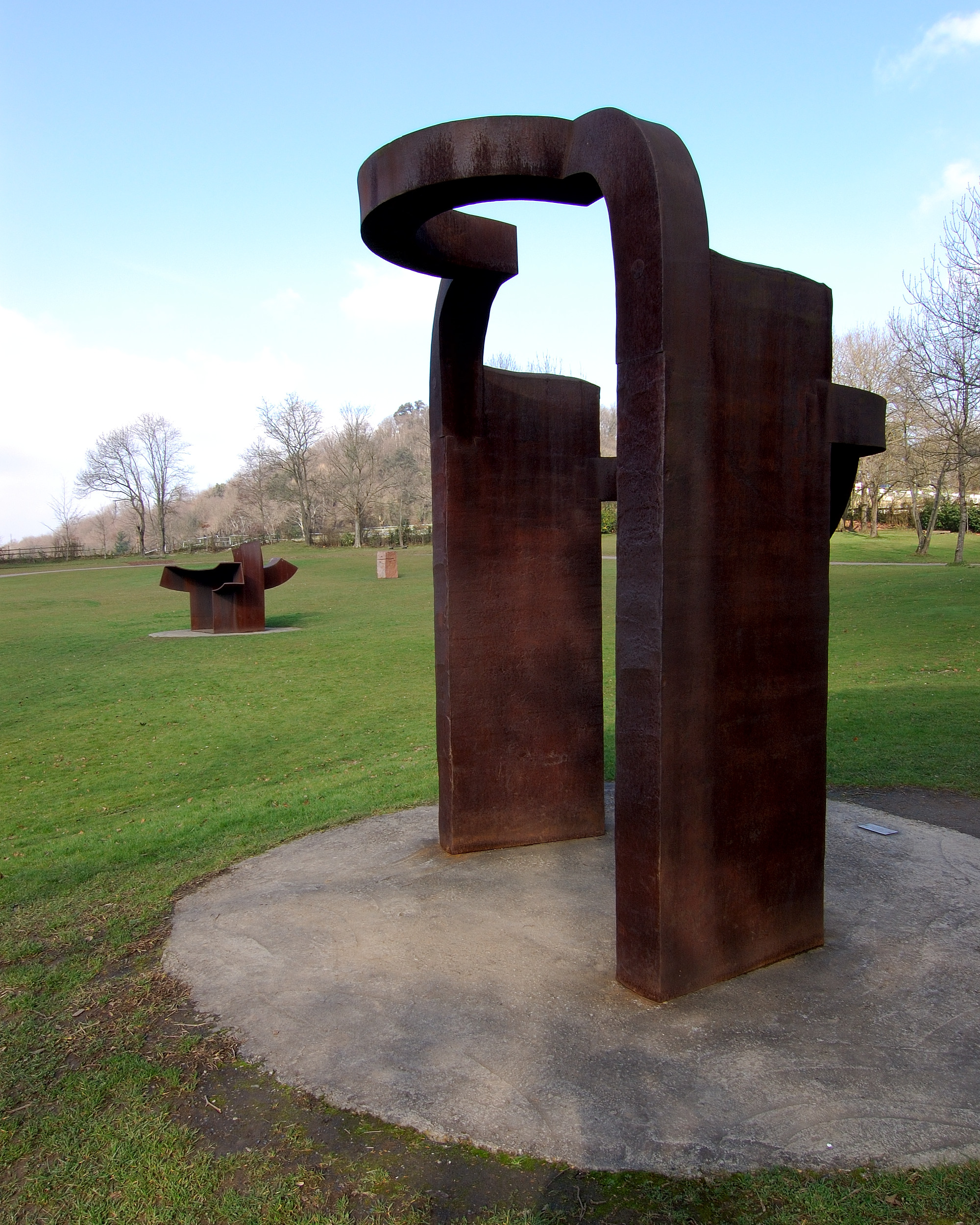 Museo Chillida-Leku, San Sebastián, Spain [2006]